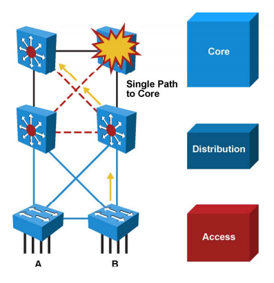 Монгол: фцуфцу